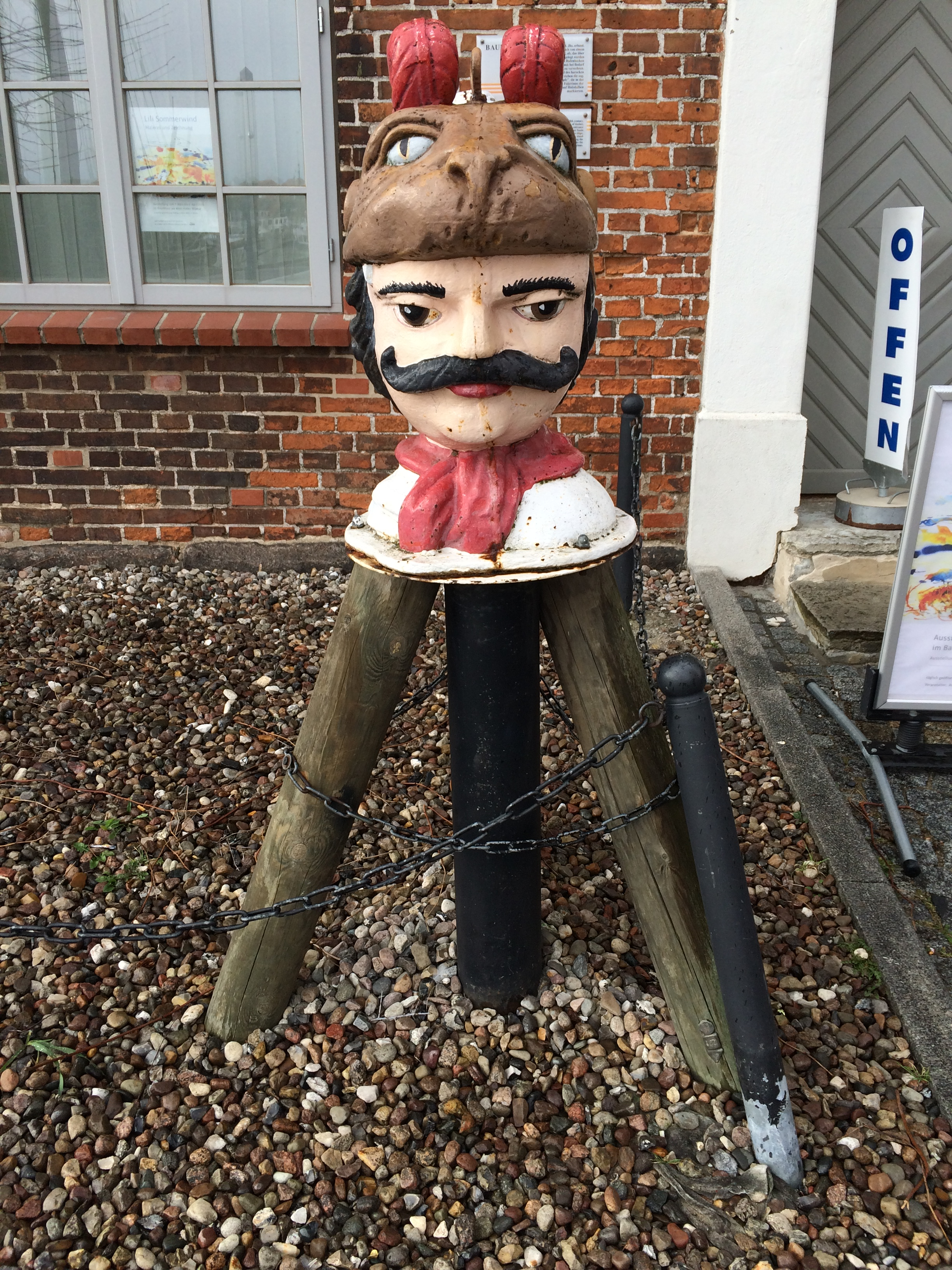 Das Baumhaus ist ein Barockbau aus dem 18. Jahrhundert, von dem aus einst die Absperrung des Hafens in Wismar überwacht wurde. Hierzu legten Angestellte des Hafens eine Kette in die Zufahrt.